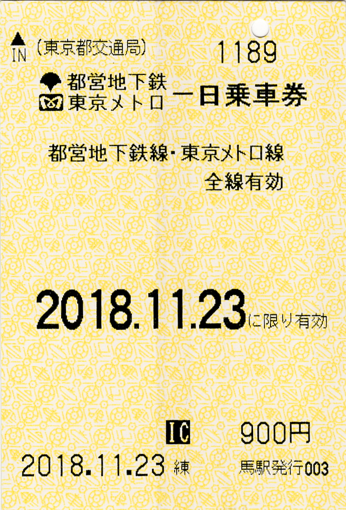 東京都交通局（都営地下鉄）発行 東京地下鉄 東京メトロ・都営地下鉄共通一日乗車券